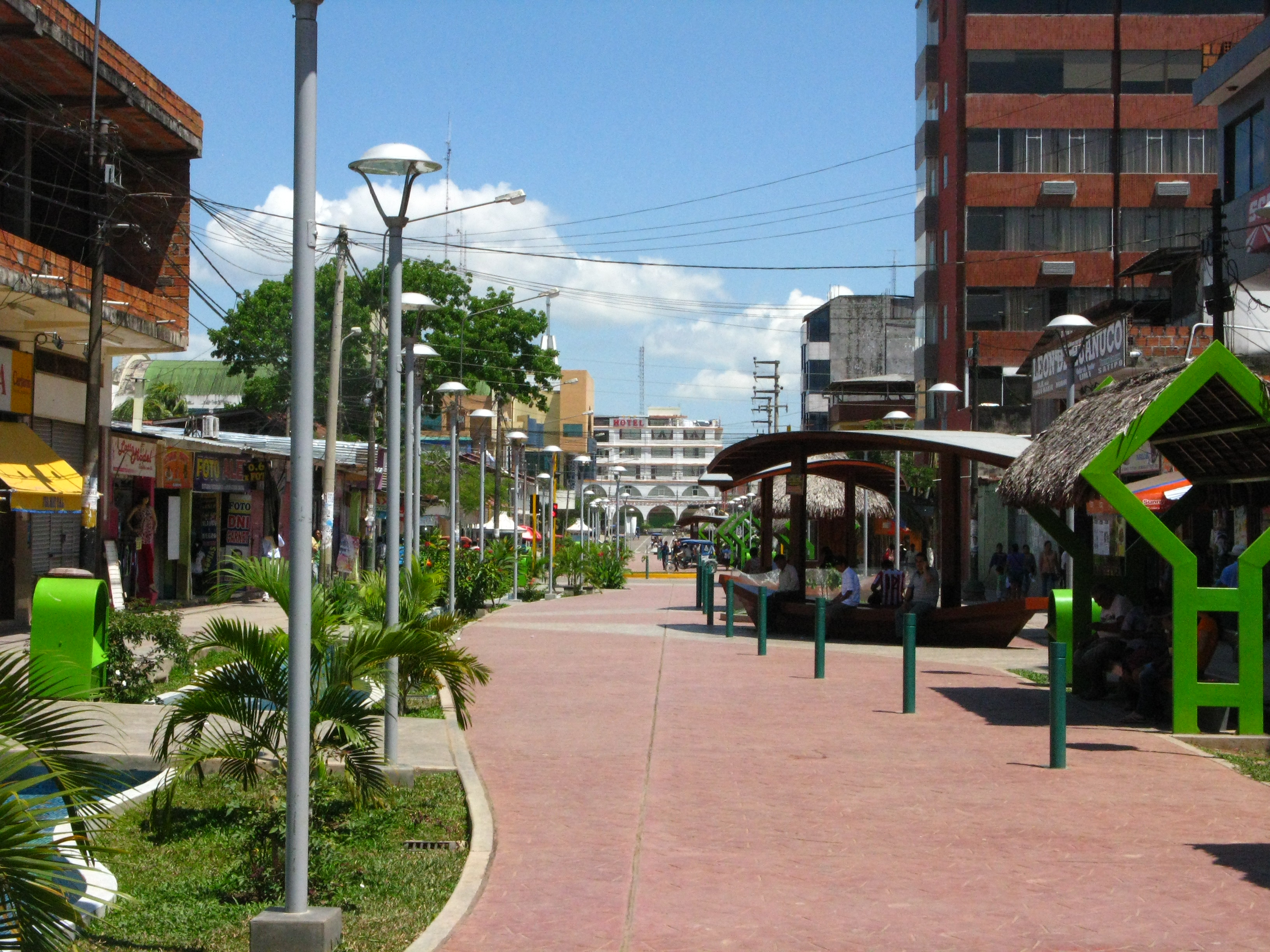 Neue Fußgängerzone in Pucallpa, Avenida Tacna.